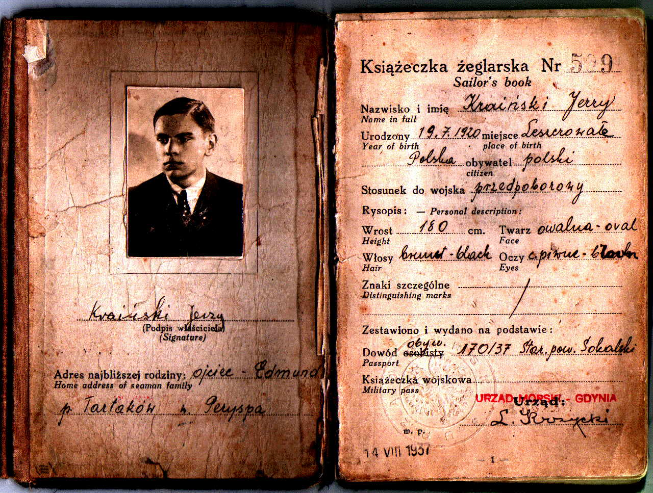 Ksiażeczka żeglarska Jerzy Kraiński 14 sierpień 1938 r.